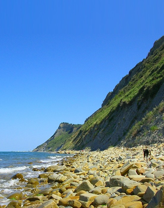 Monte Bartolo